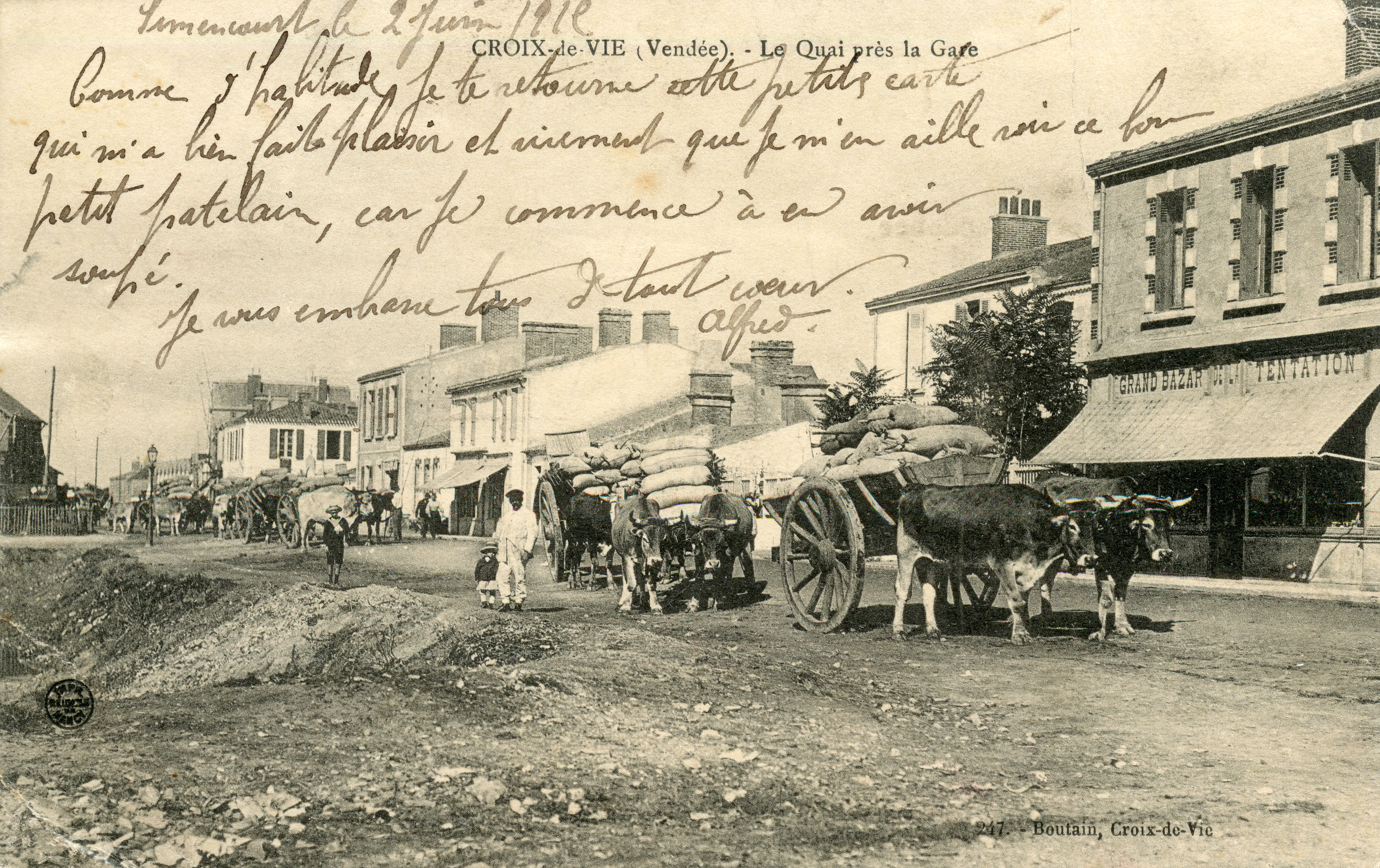 Carte postale de Croix-de-Vie, département de Vendée, en France. Le quai près la Gare. Le Grand Bazar de la tentation, boutique d'Adeline Boutain. Collection Boutain, Croix-de-Vie, no 247. Phototypie.